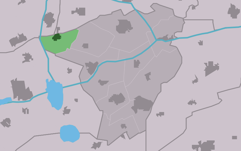 Kaartsje fan himrik fan Twizelerheide